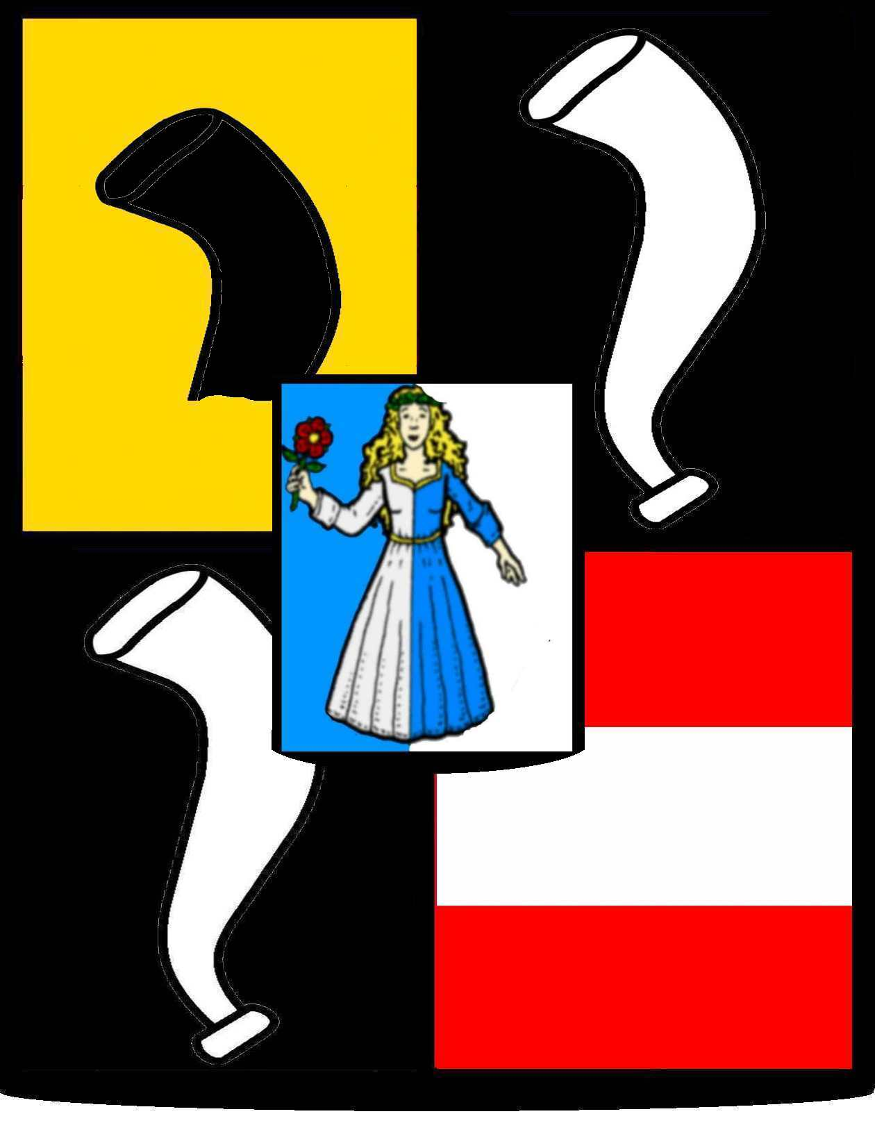 COA Buol-Strassberg Der quadrierte Schild, zeigt in Feld 1 in Gold ein schwarzes halbes umgekehrtes Büffelhorn, in Feld 2 und 3 in Schwarz das ganze silberne Büffelhorn, in Feld 4 in Rot ein silberner Querbalken; als Herzschild von Blau und Silber gespalten eine Jungfrau verwechselter Farbe mit einer Rose (ursprünglich Kleestengel) in der Hand, das Stammwappen derer von Buol